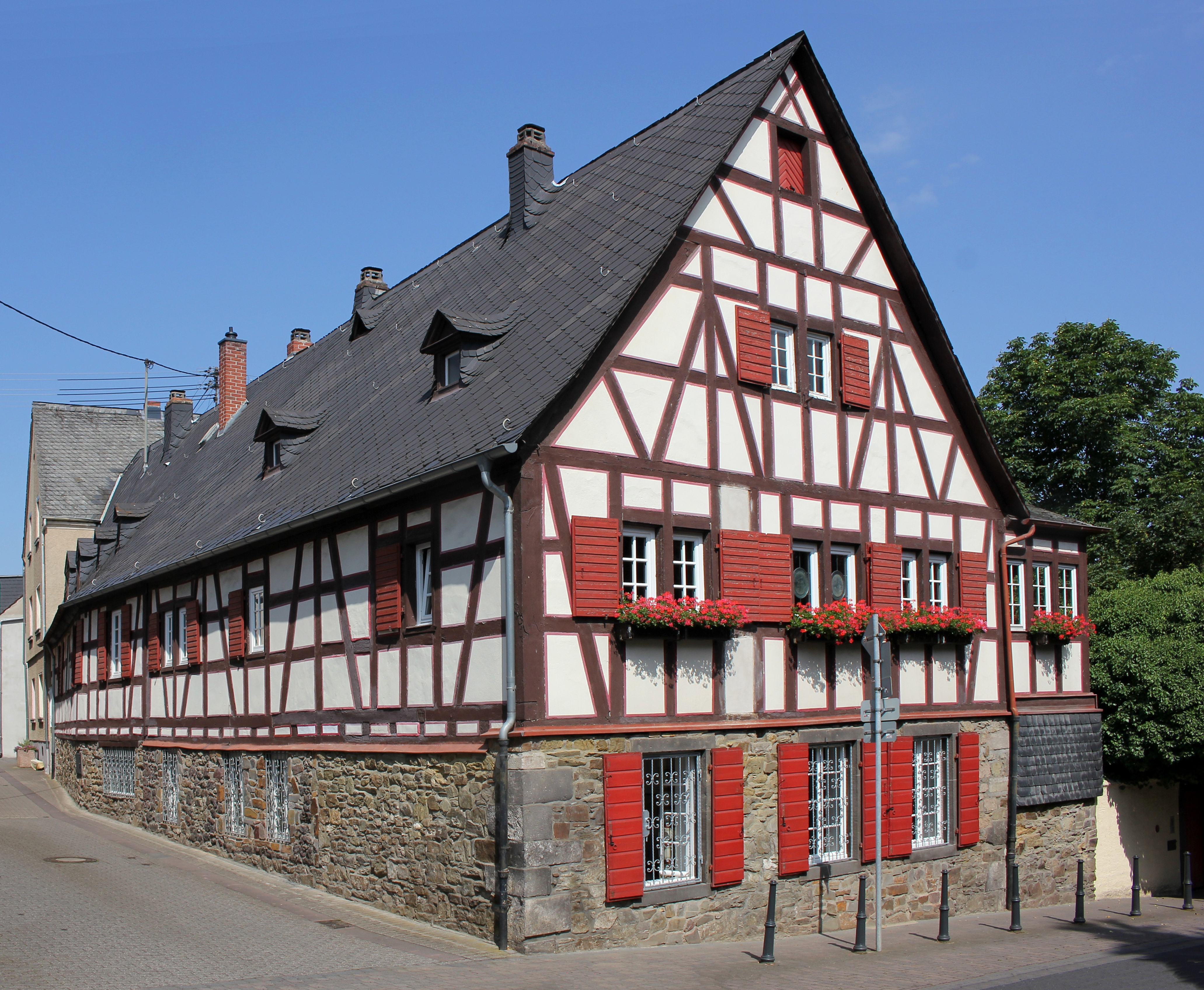 Burghof in Mülheim-Kärlich, Burgstraße 9, erbaut um 1710 an der Stelle eines früheren Hauses